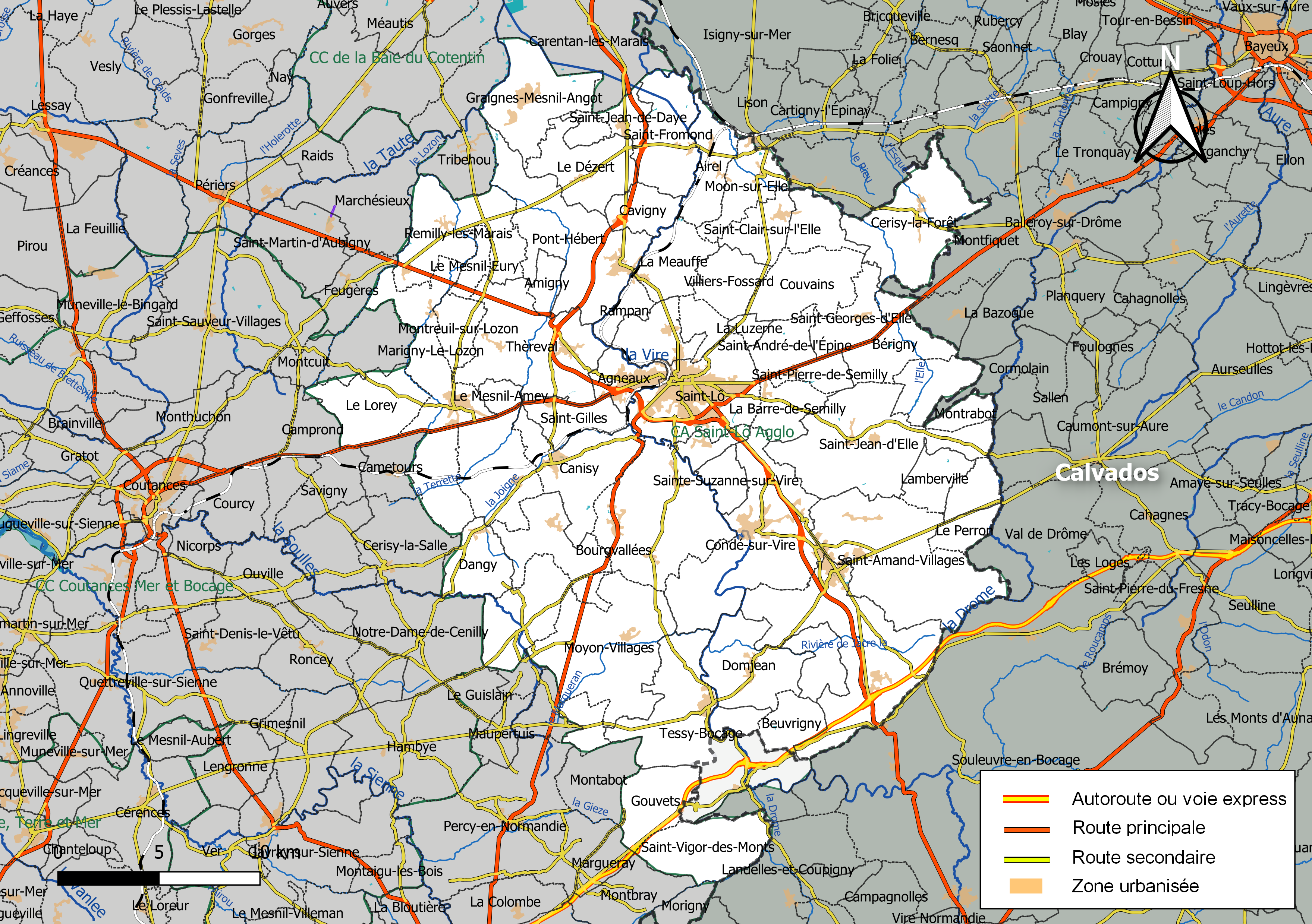 Carte géographique de l'intercommunalité Saint-Lô Agglo, département de la Manche, France. Composition au 1er janvier 2019.